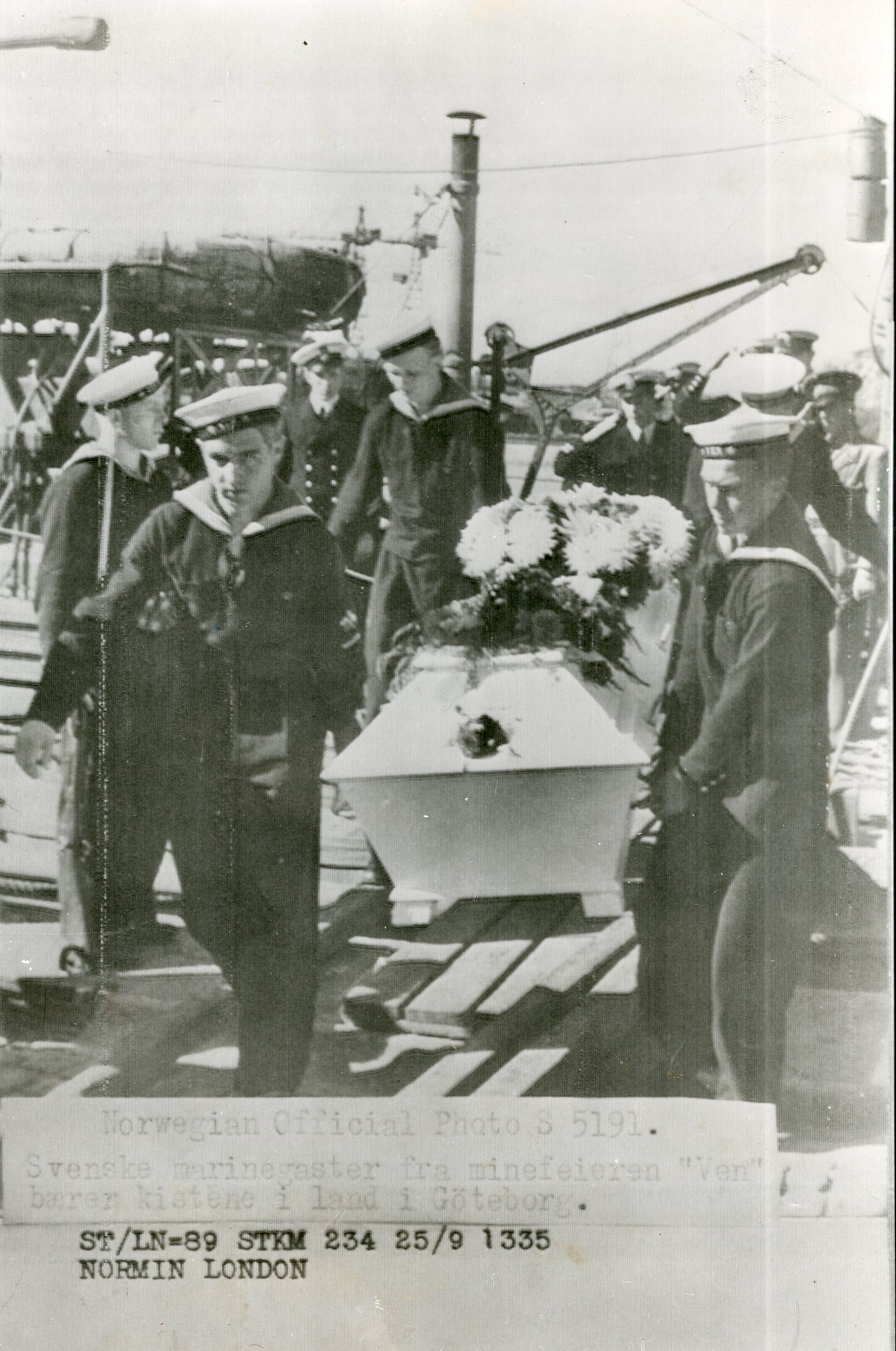 Det tyske fangeskipet ”Westfalen” hadde da det ble senket på vei mellom Norge og Tyskland ca. 50 norske fanger om bord. 35 av de omkomne nordmenn ble ført på marinefartøyet ”Ven” til Gøteborg, hvor kistene ble anbragt i Domkirken. Her fant det sted en minnehøytidelighet, og kirken var fylt til siste plass. Tilstede var norske og svenske myndigheter samt representanter for allierte og nøytrale konsulater. Mens den gripende høytidelighet fant sted, sto 6 unge nordmenn med norske flagg ved bårene. Mange slektninger og pårørende av de omkomne var kommet til stede fra forskjellige kanter av Sverige, og til alle bårer var det blomster og kranser fra slekt og venner i Sverige. S 5191: Bildet viser svenske marinegaster fra marinefartøyet ”Ven” bringe kistene i land i Gøteborg. RA/PA-1209/Uc/67/1/S 5191